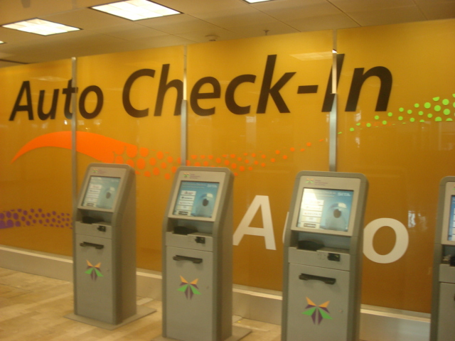 Terminar 2 del Aeropuerto